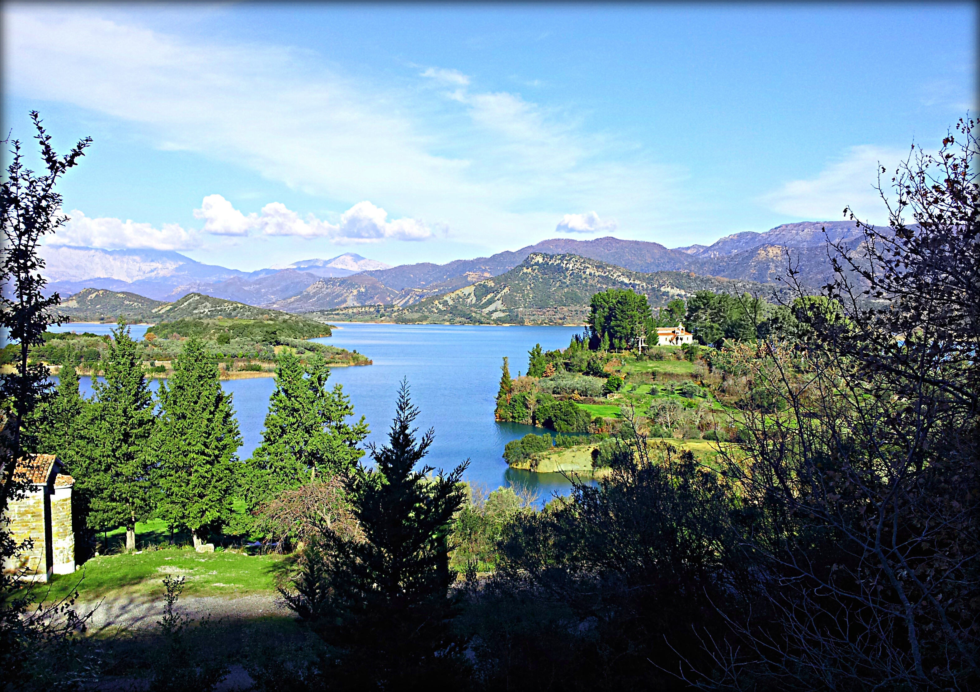 Kastraki lake - Aetolia & Acarnania regional unit - Greece